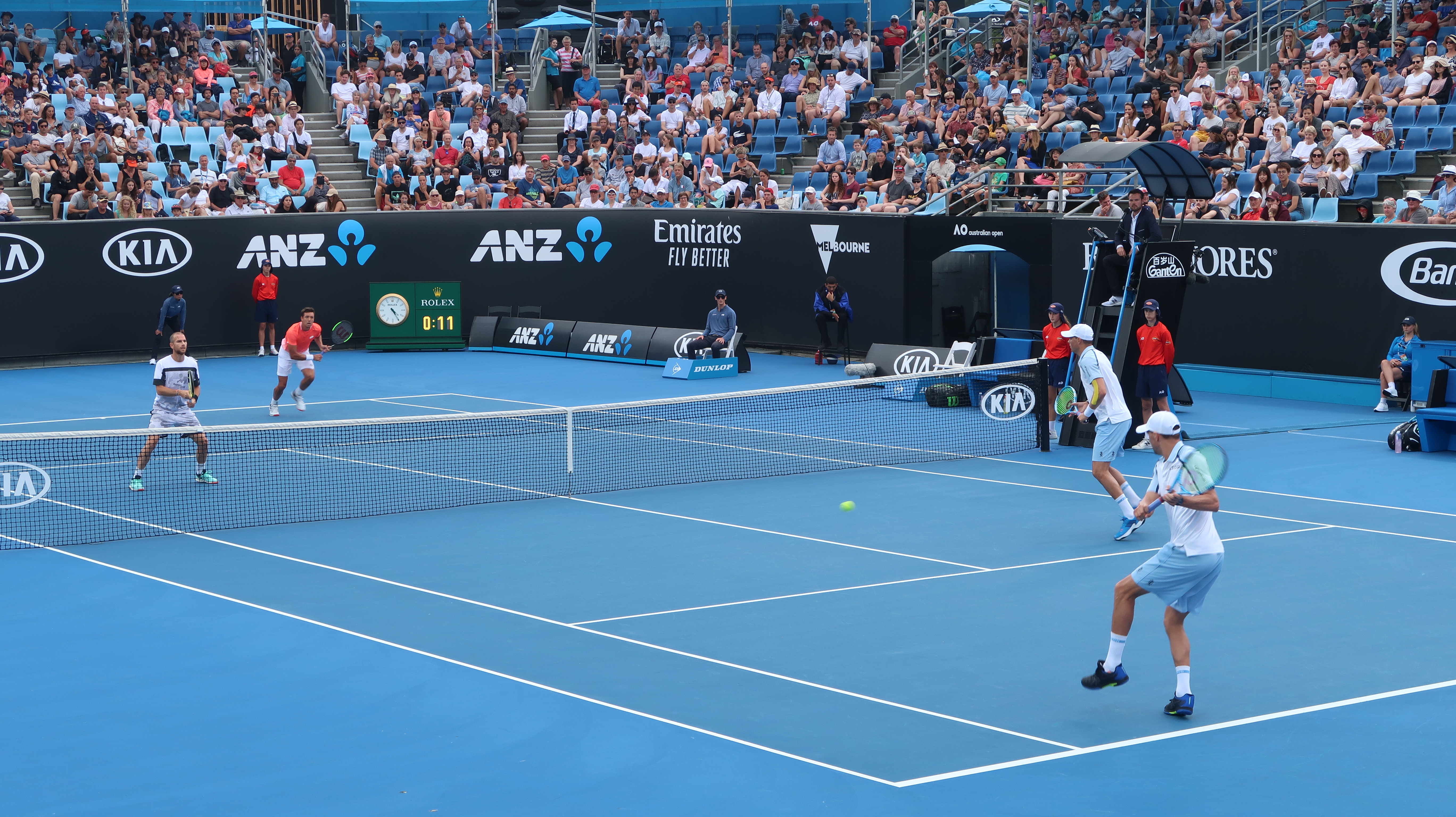 2019 Australian Open